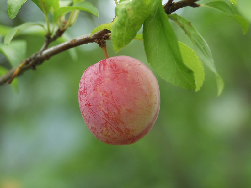 スモモ 撮影場所：広見町 この画像は草花写真館 ( 撮影者はカールおじさんです。 HPに自由に使用してよいとの旨の内容があります。